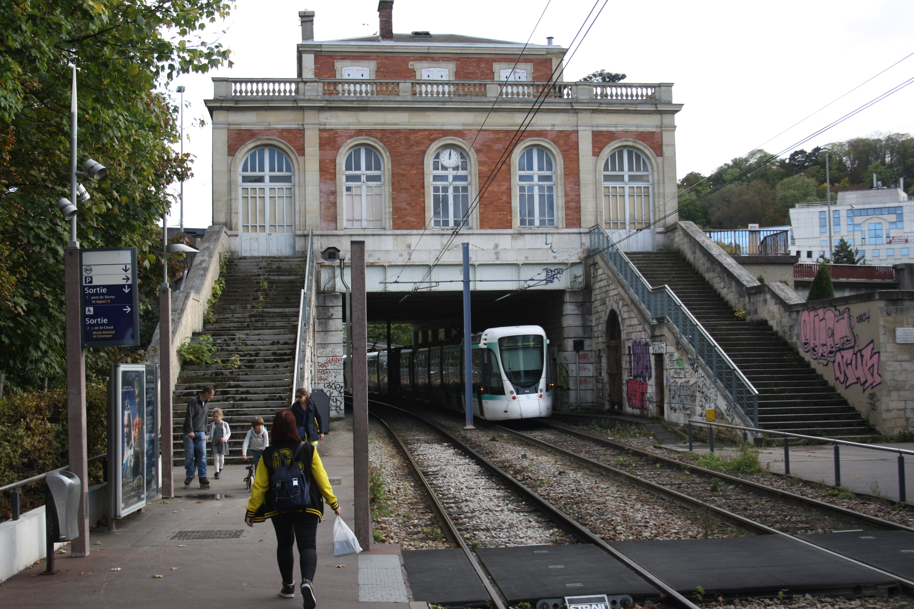 Station Musée de Sèvres der Straßenbahnlinie 2 in Sèvres